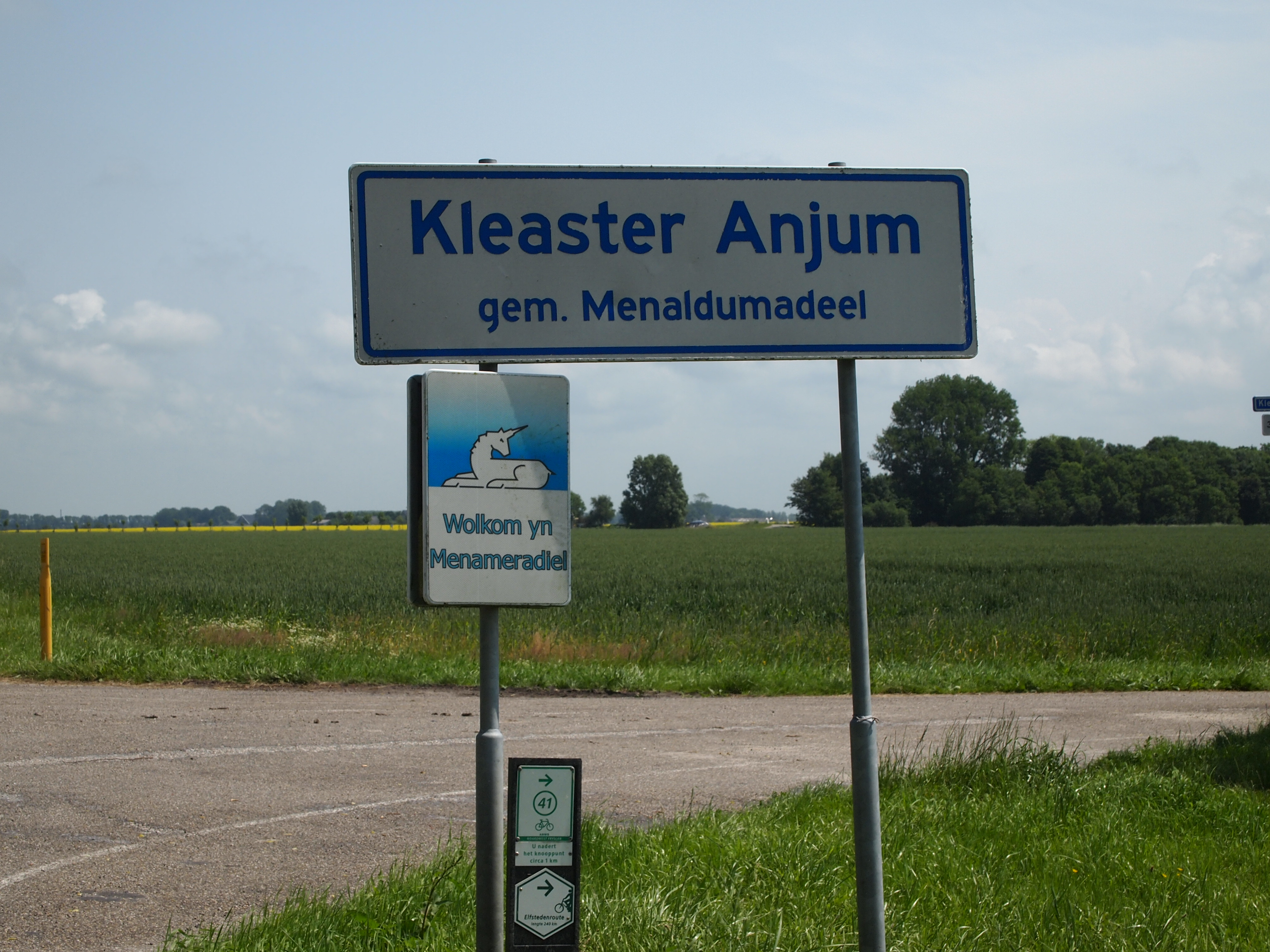 Wolkom yn Kleaster Anjum